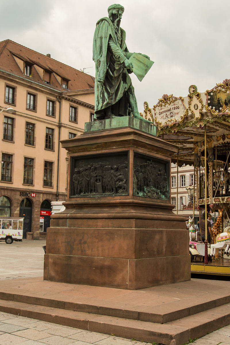 _DSC0023.jpg